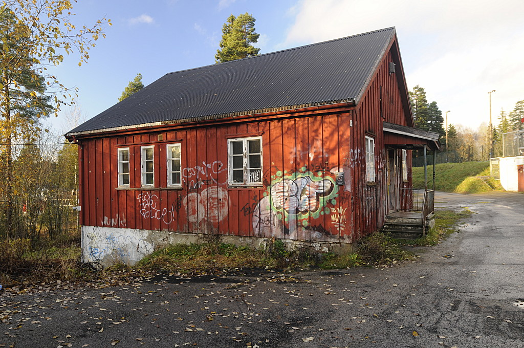 Restene av Magasinleiren på Jessheim